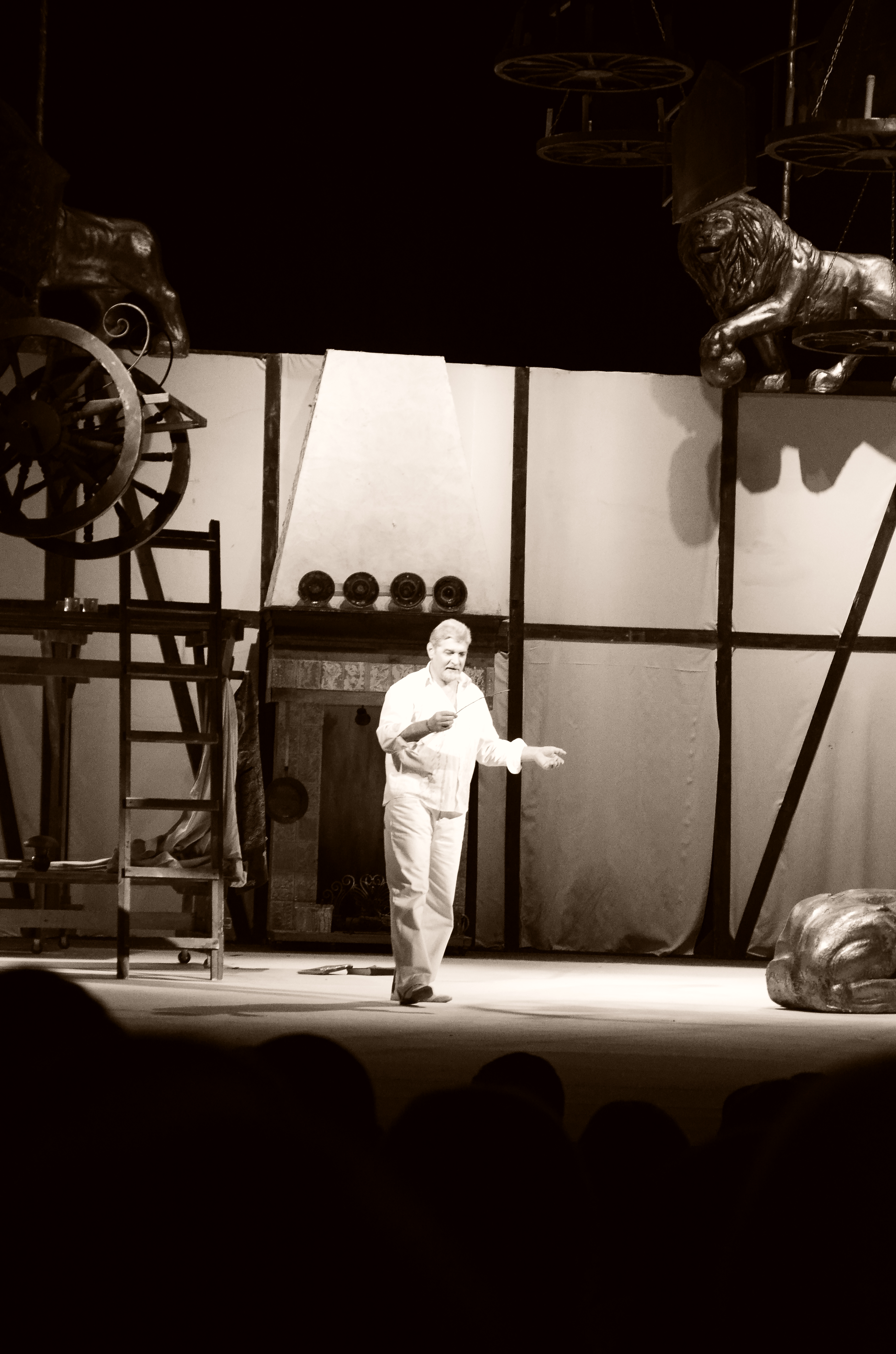 Спектакль «Обыкновенное чудо» в Донецком драматическом театре